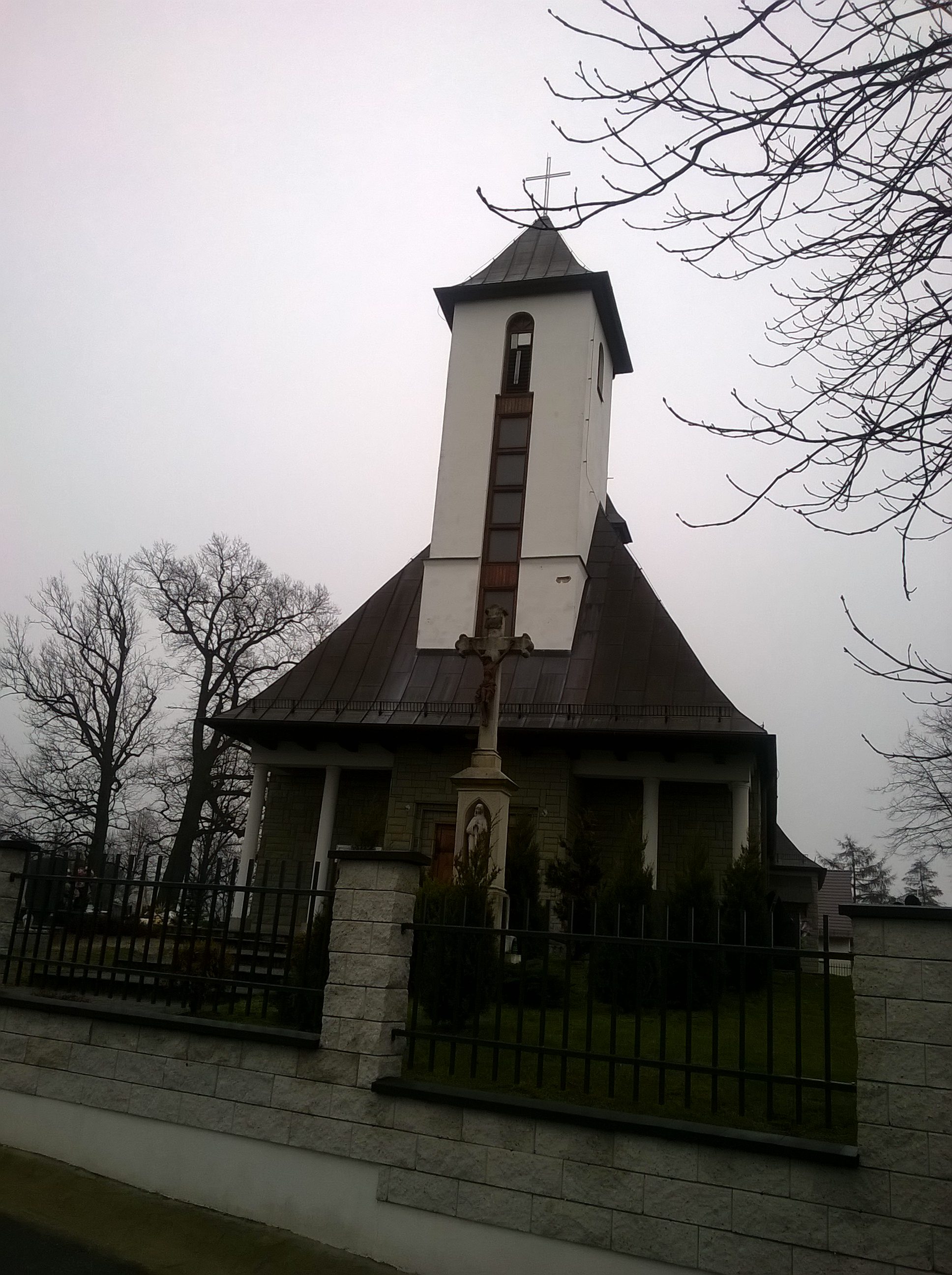 Łącza, kościół